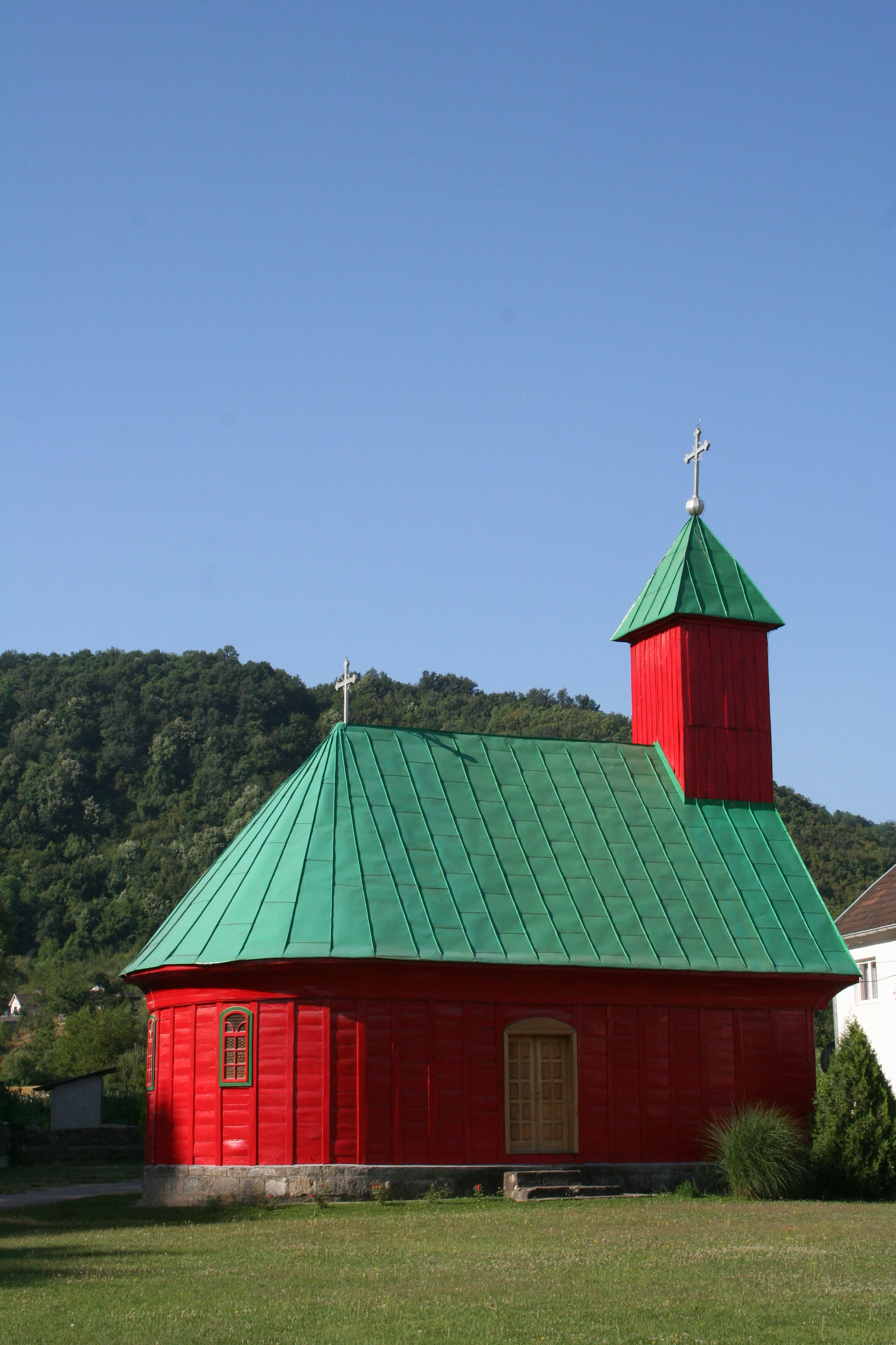 Crkva Sv. Matije, Kamenica